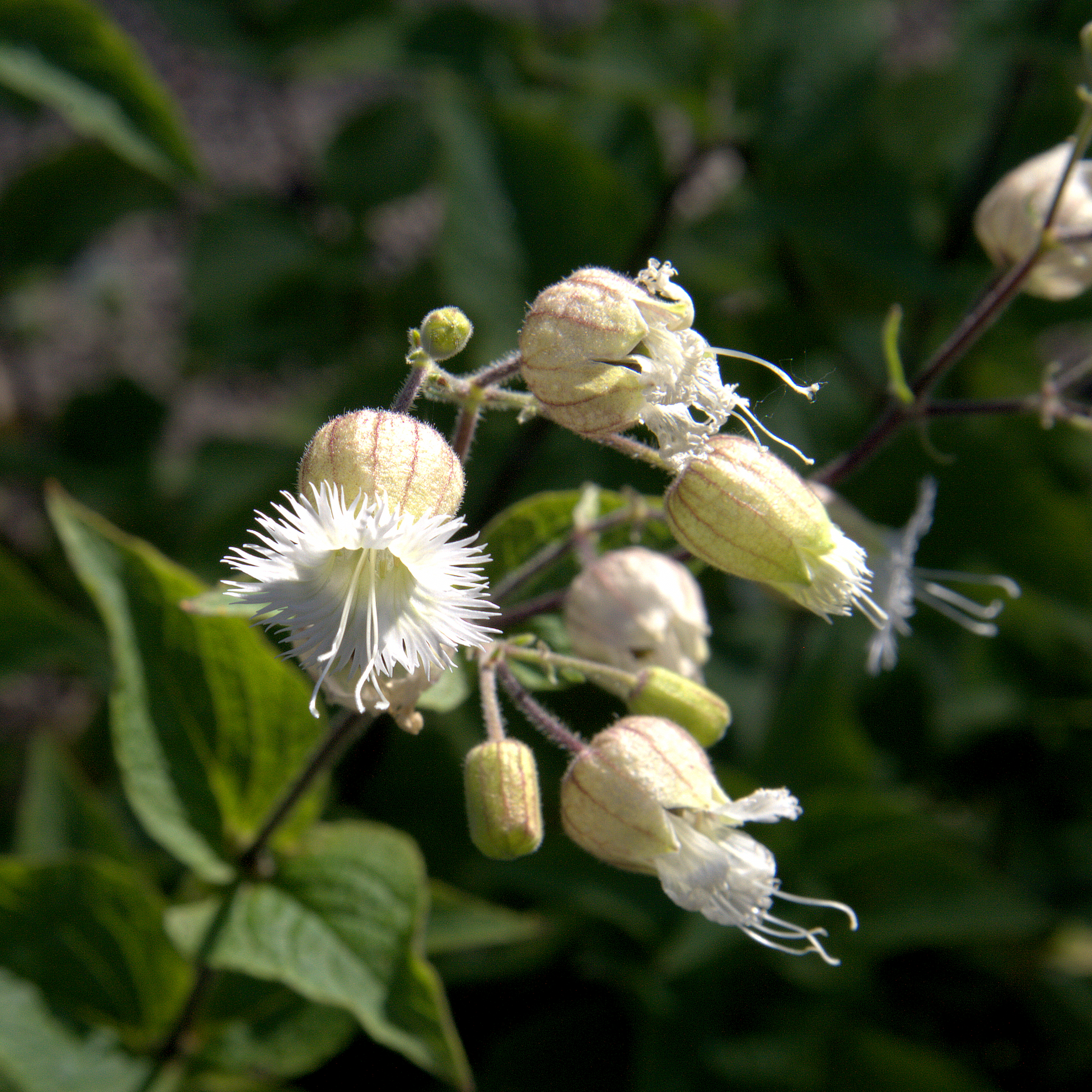 Silene multifida (fransglim)